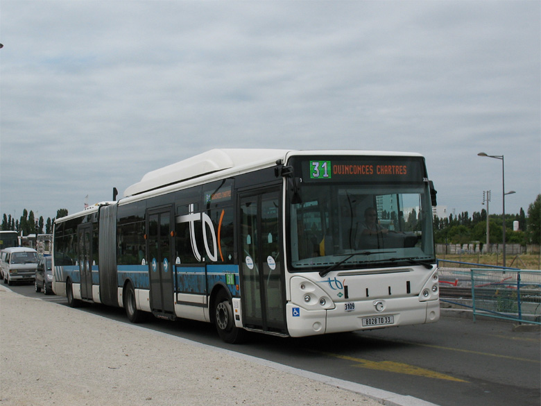 Photo d'un bus (ligne 31) du réseau TBC de Bordeaux - Aquitaine - France